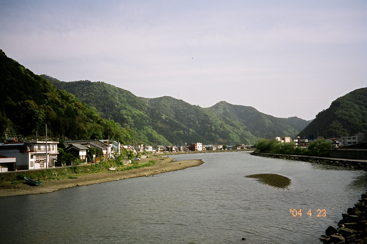 愛媛県宇和島市を流れる岩松川。奥が下流。